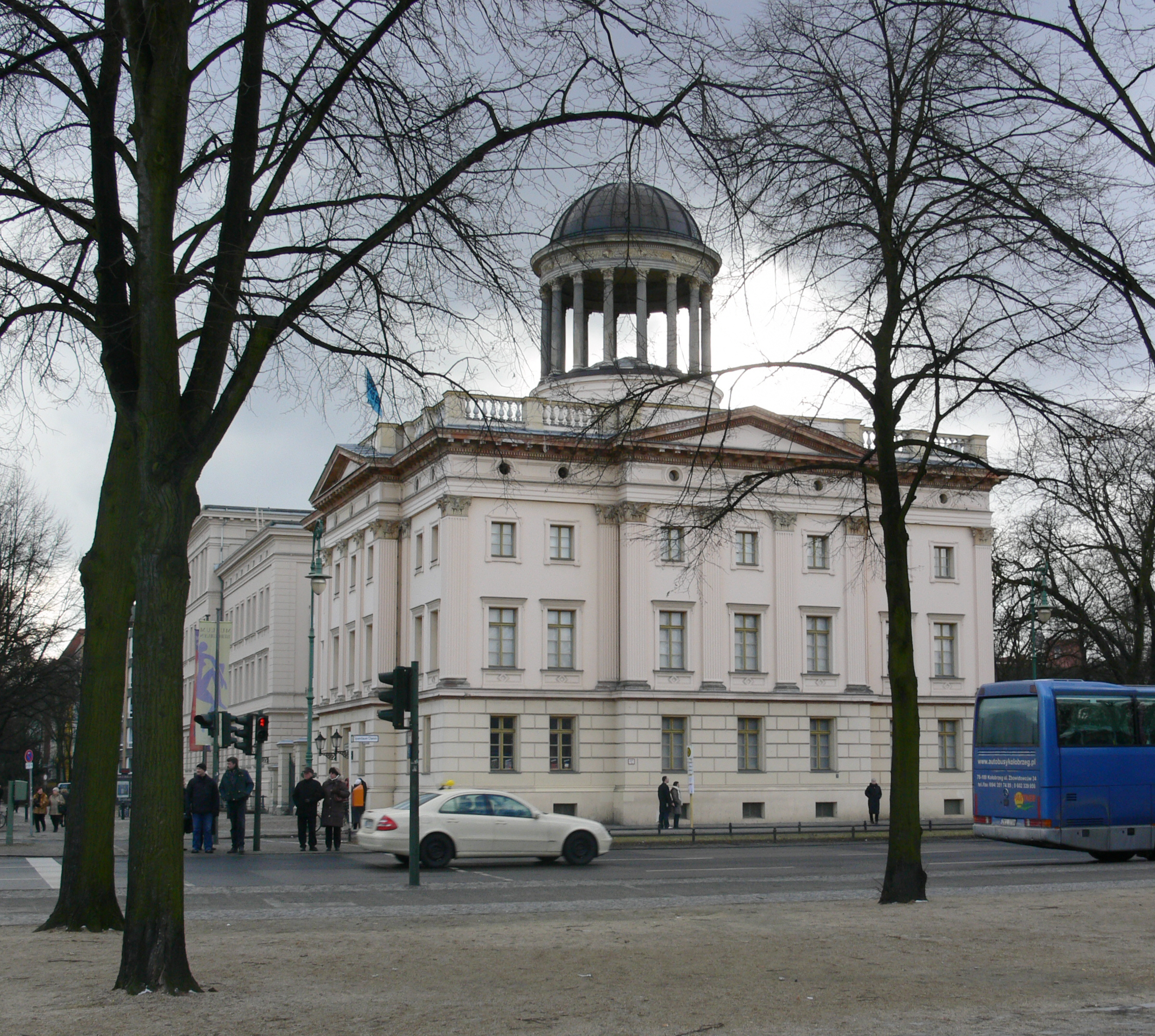 Sammlung Berggruen (formerly Antikensammlung), Westlicher Stülerbau, Berlin-Charlottenburg (in the background: the Bröhan-Museum)